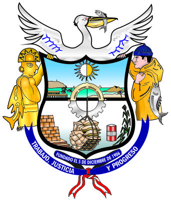 El escudo de la municipalidad distrital de Supe Puerto